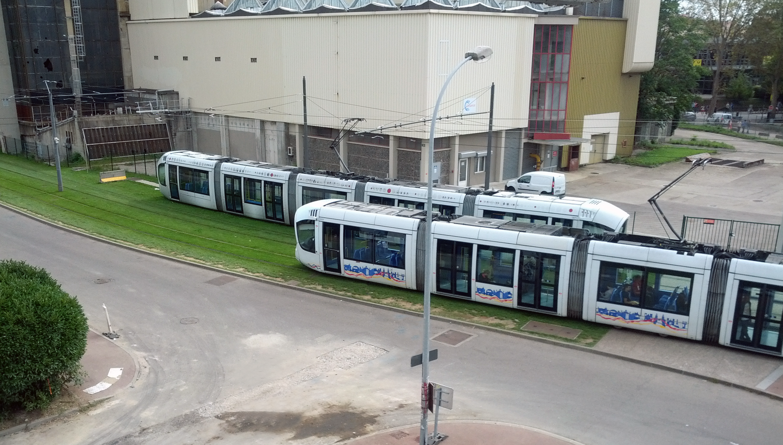 Rames Citadis du tramway de Lyon entre les stations Gaston Berger et INSA-Einstein sur les lignes T1/T4. La rame Citadis 302 au premier plan est en service sur T1 et roule vers Gaston Berger. La rame en arrière plan est en service T4 et effectue son retournement après le terminus.